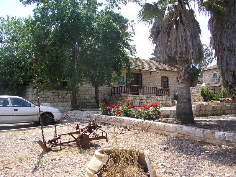 מרכז ההדרכה על שם בן גוריון בסג'רה, היא אילניה. צולם על ידי